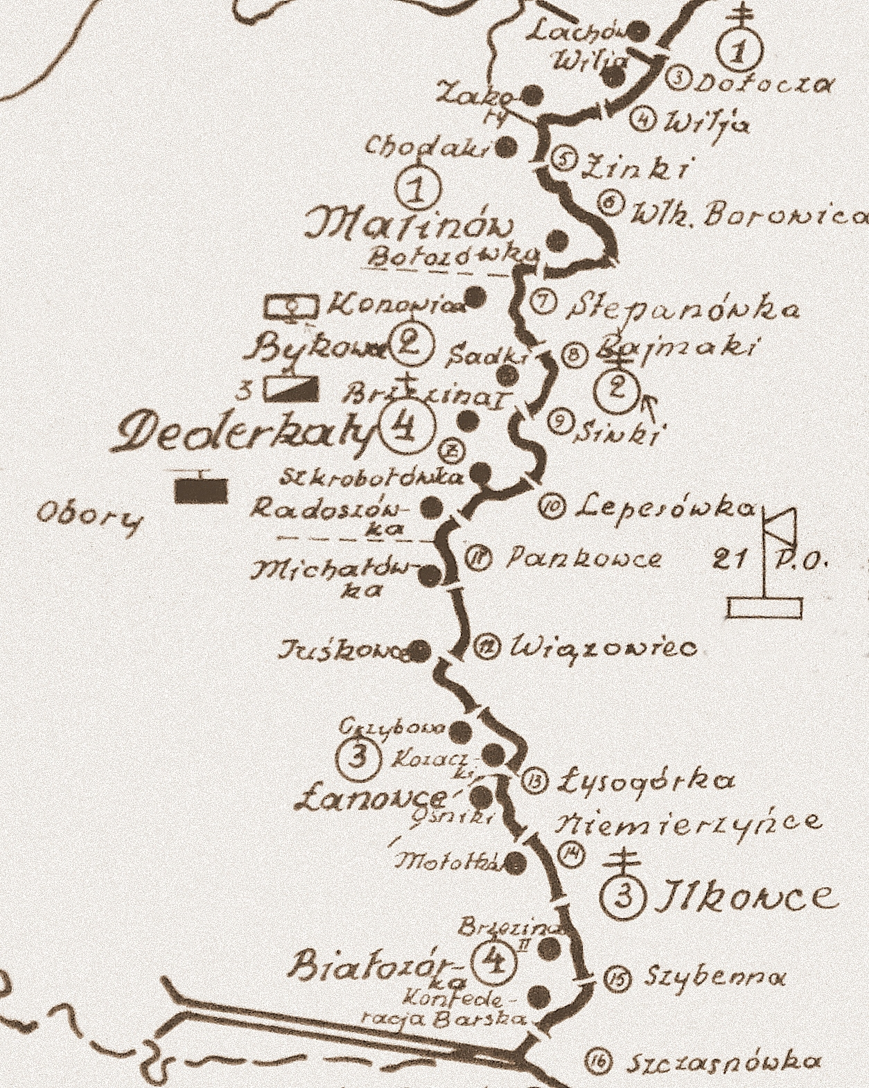 Szkic rozmieszczenia batalionu KOP Dederkały w 1931